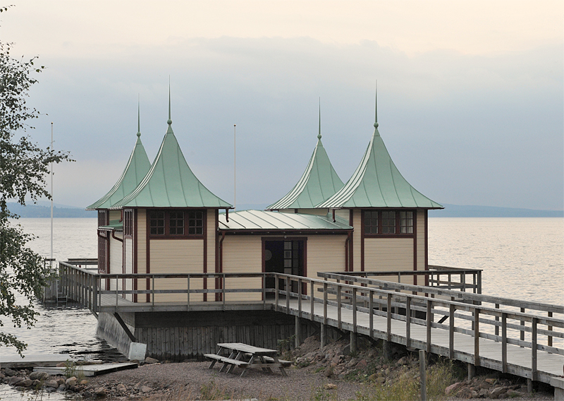 Persborgs brygga vid Siljan i Sjurbergs by, Rättviks kommun